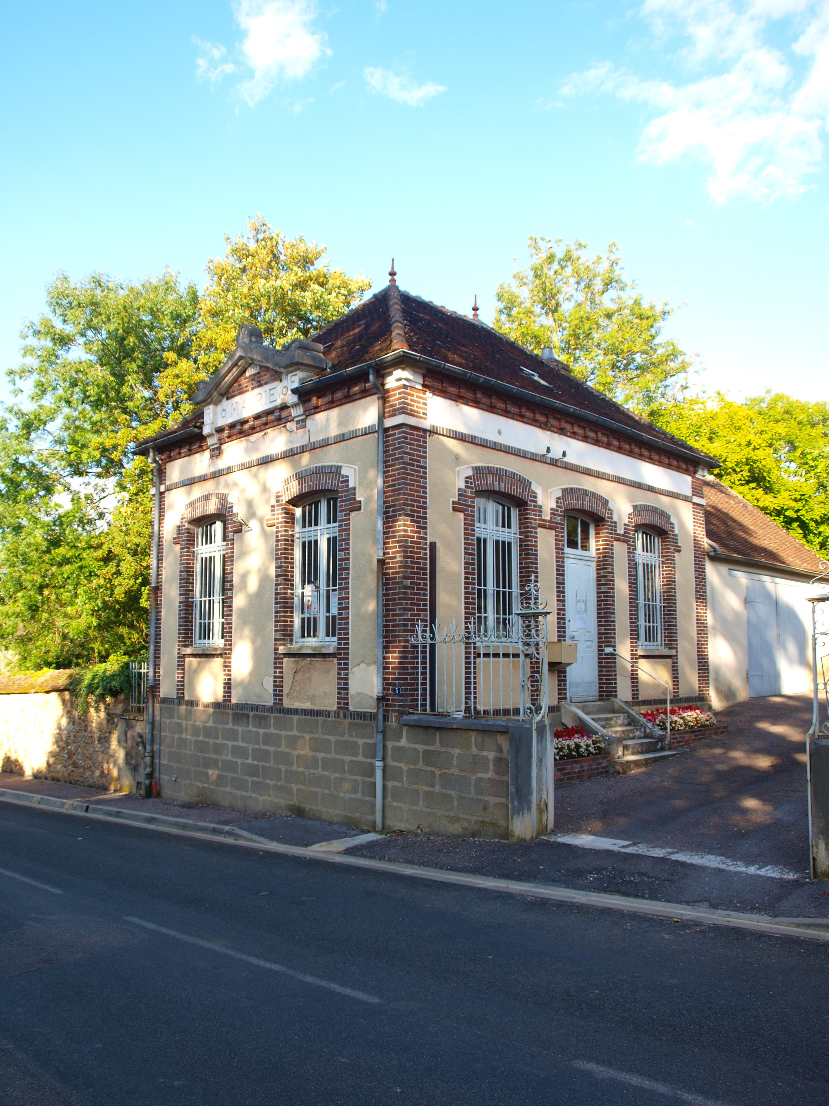 Thorigny-sur-Oreuse (Yonne, France) ; commune associée de Fleurigny : mairie